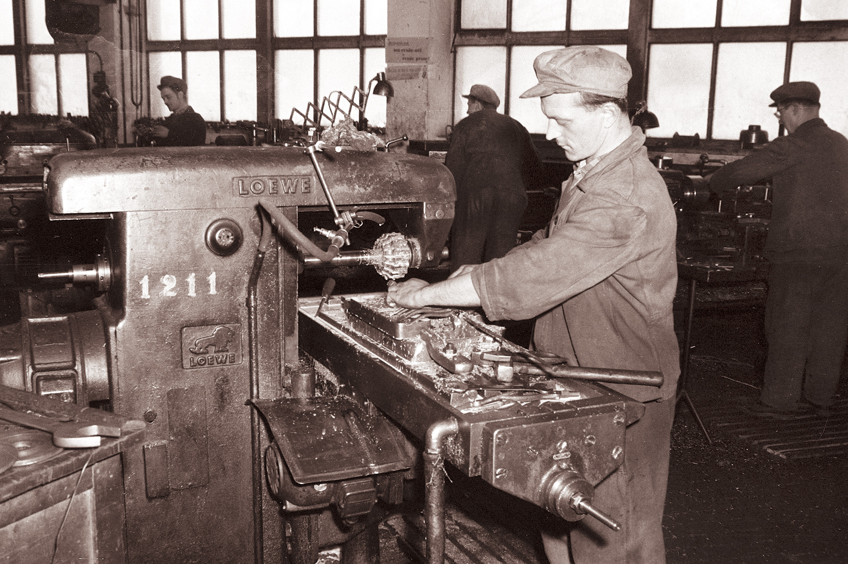 Tovarna kovanega orodja v Zrečah